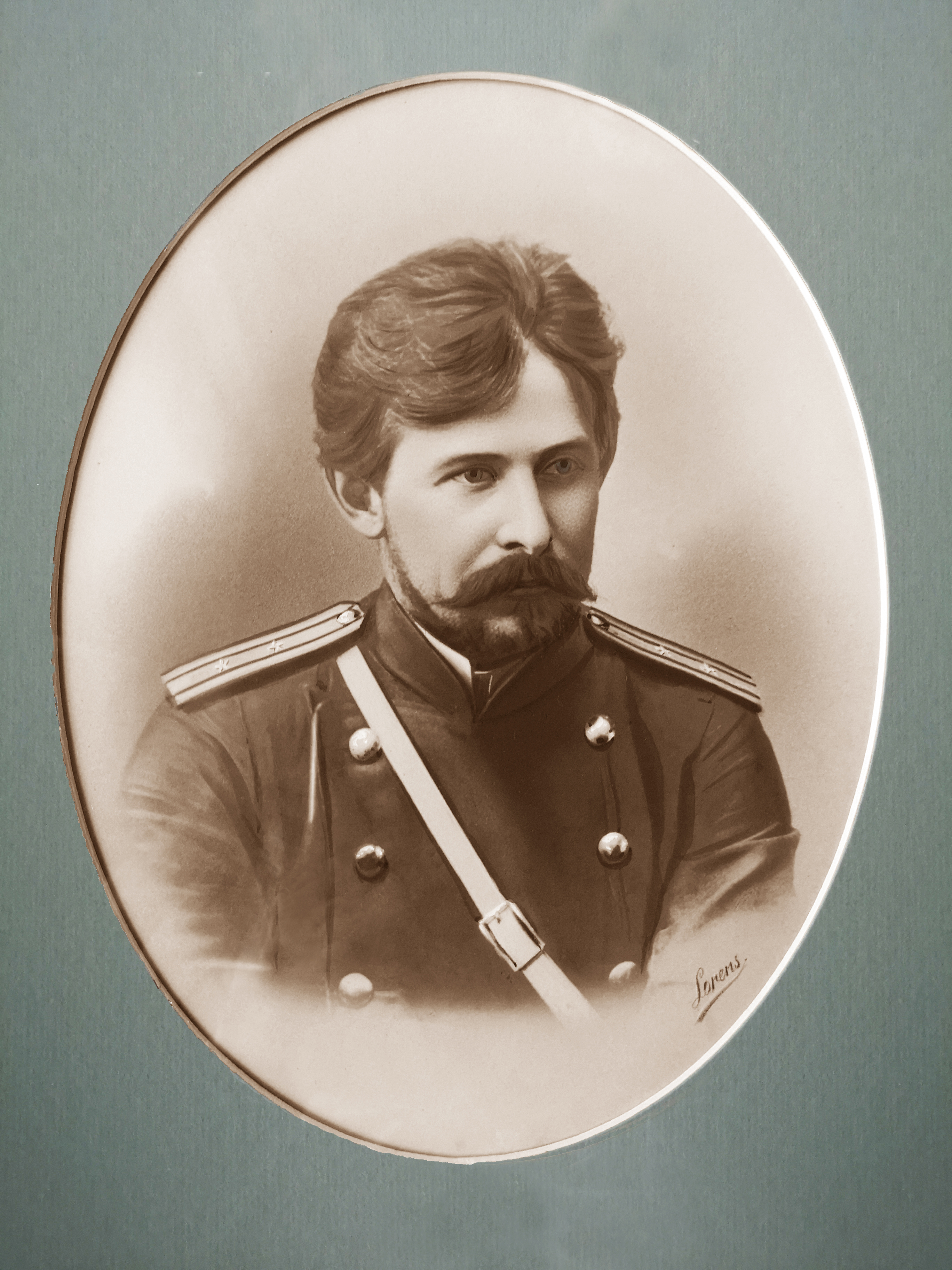 Доктор медицины Евгений Николаевич Коренев (1867 - 1945) в чине коллежского асессора